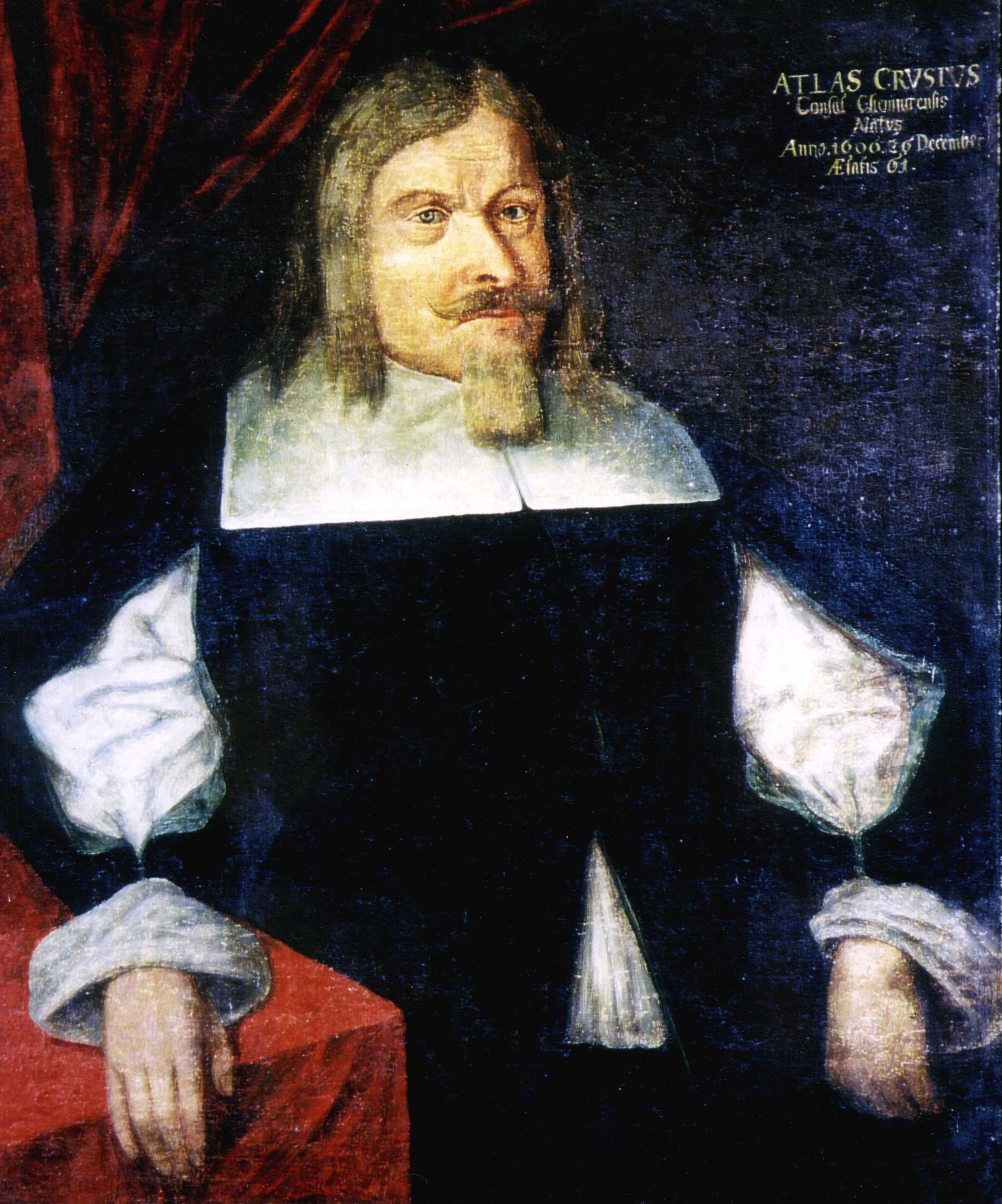 Atlas Crusius. Ölgemälde eines unbekannten Künstlers, Stadtarchiv Chemnitz. Als Leihgabe im Alten Rathaus Chemnitz, Standesamt.